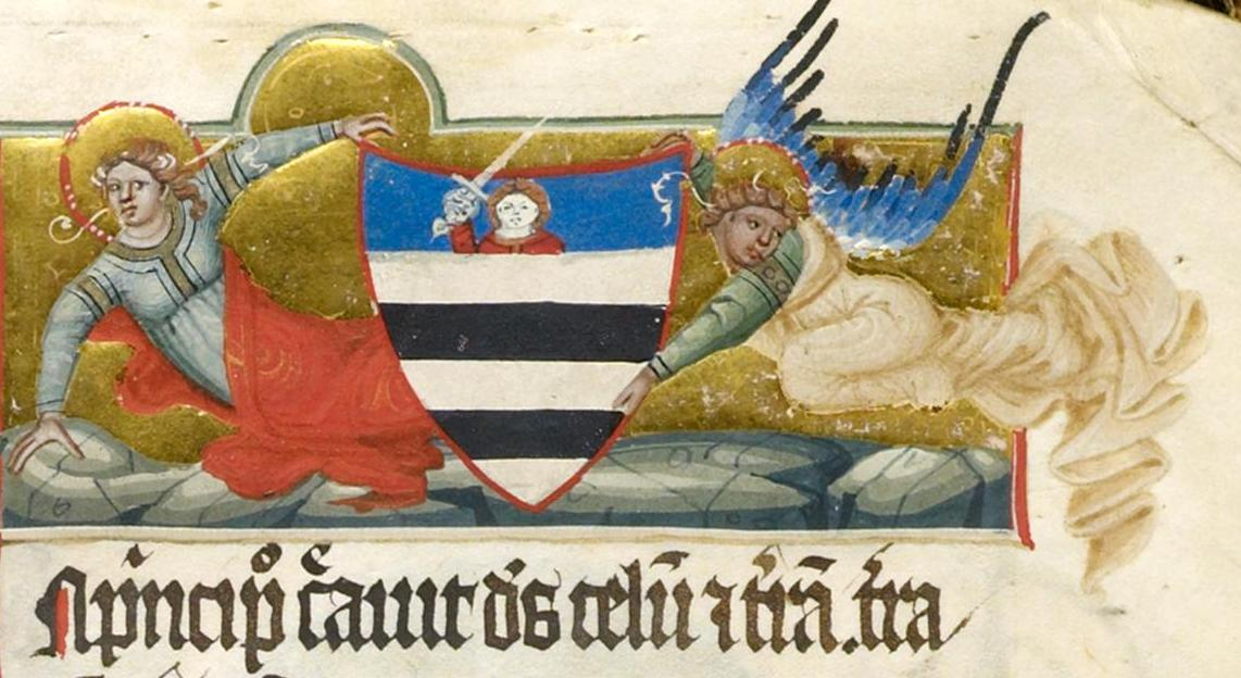 Nekcsei Demeter tárnokmester címere. A Nekcsei biblia miniatúrájának részlete, Washington D. C., Library of Congress